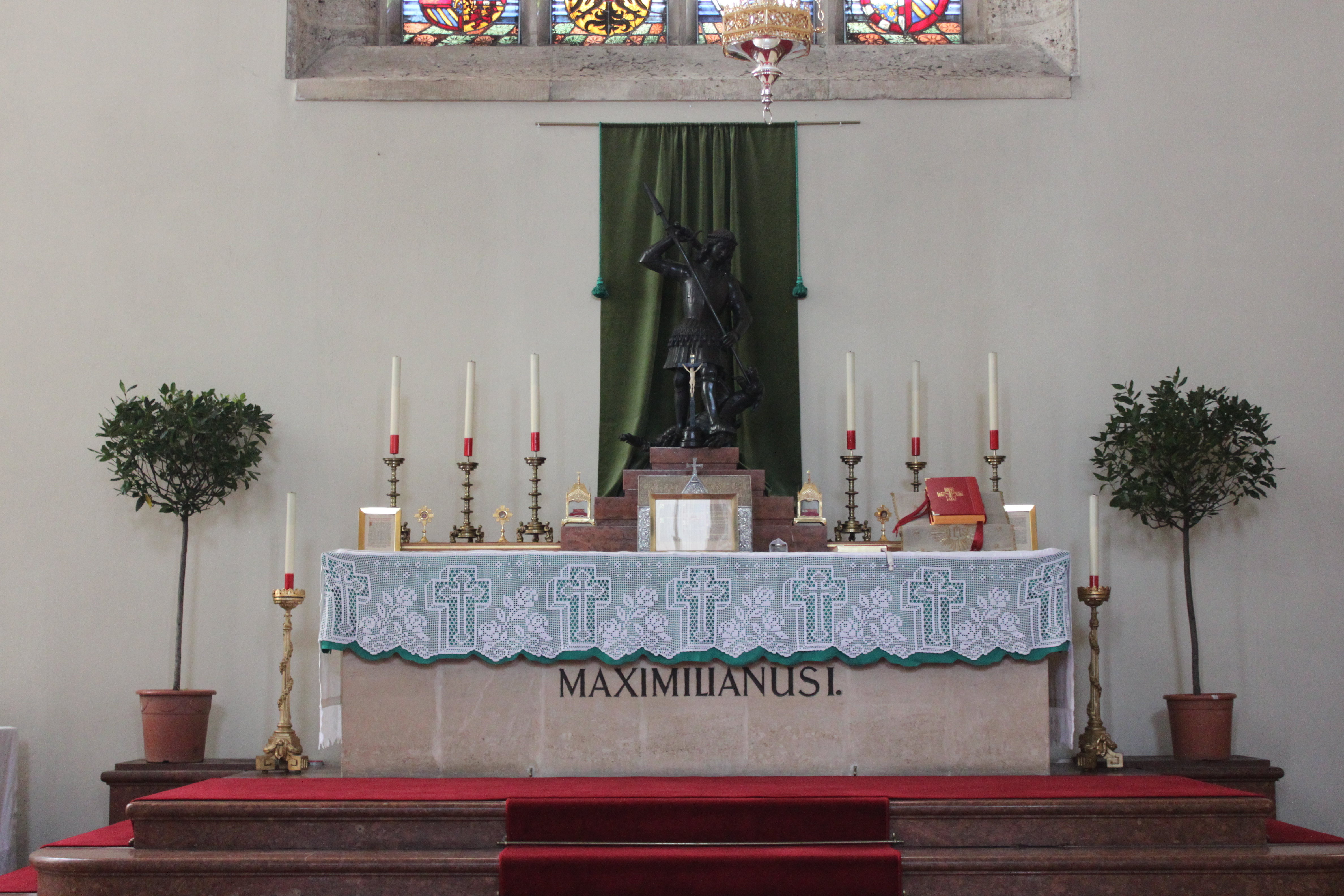 Georgskapelle, Altar und Grabstätte. Wiener Neustadt.